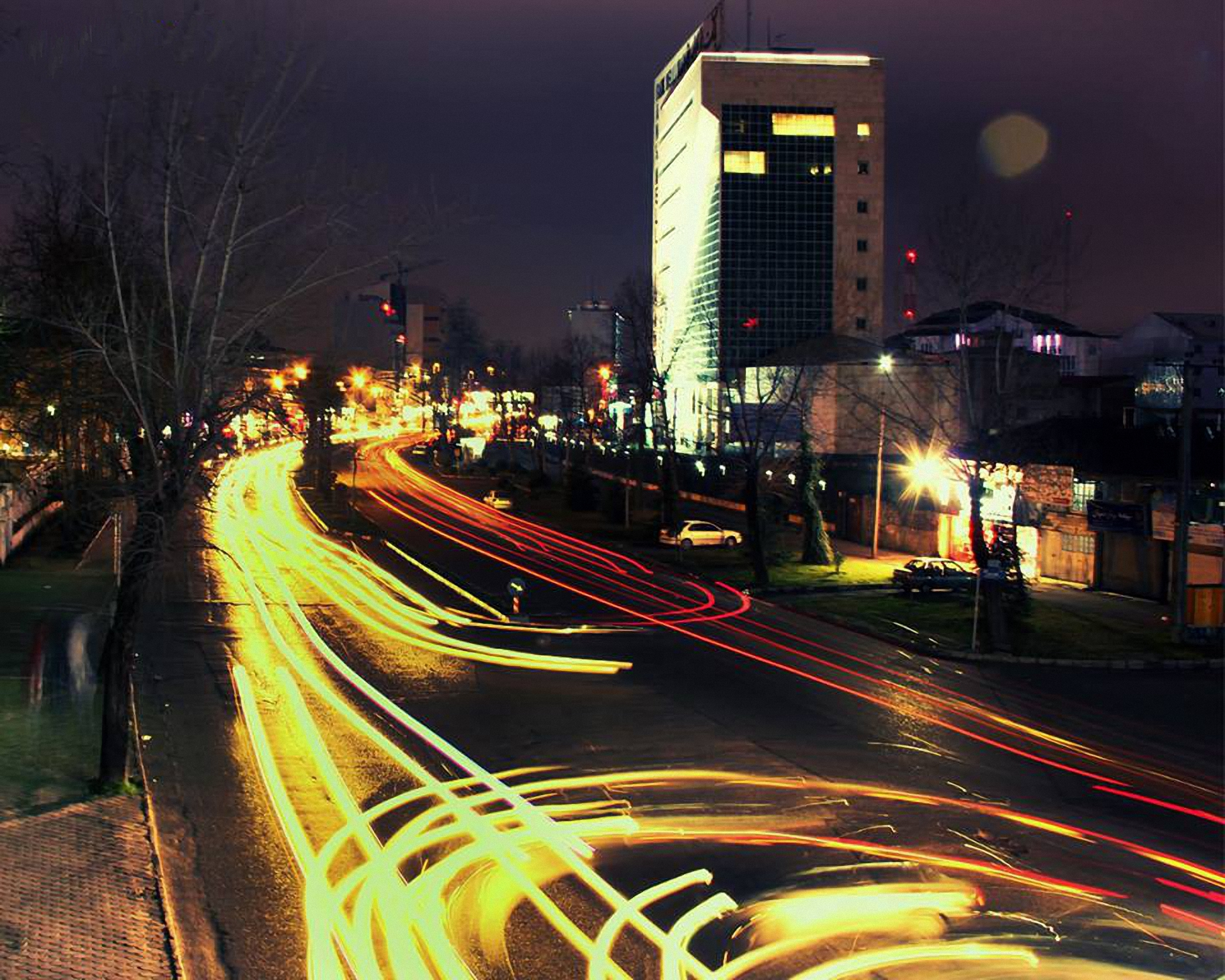 نمایی از خیابان انصاری رشت